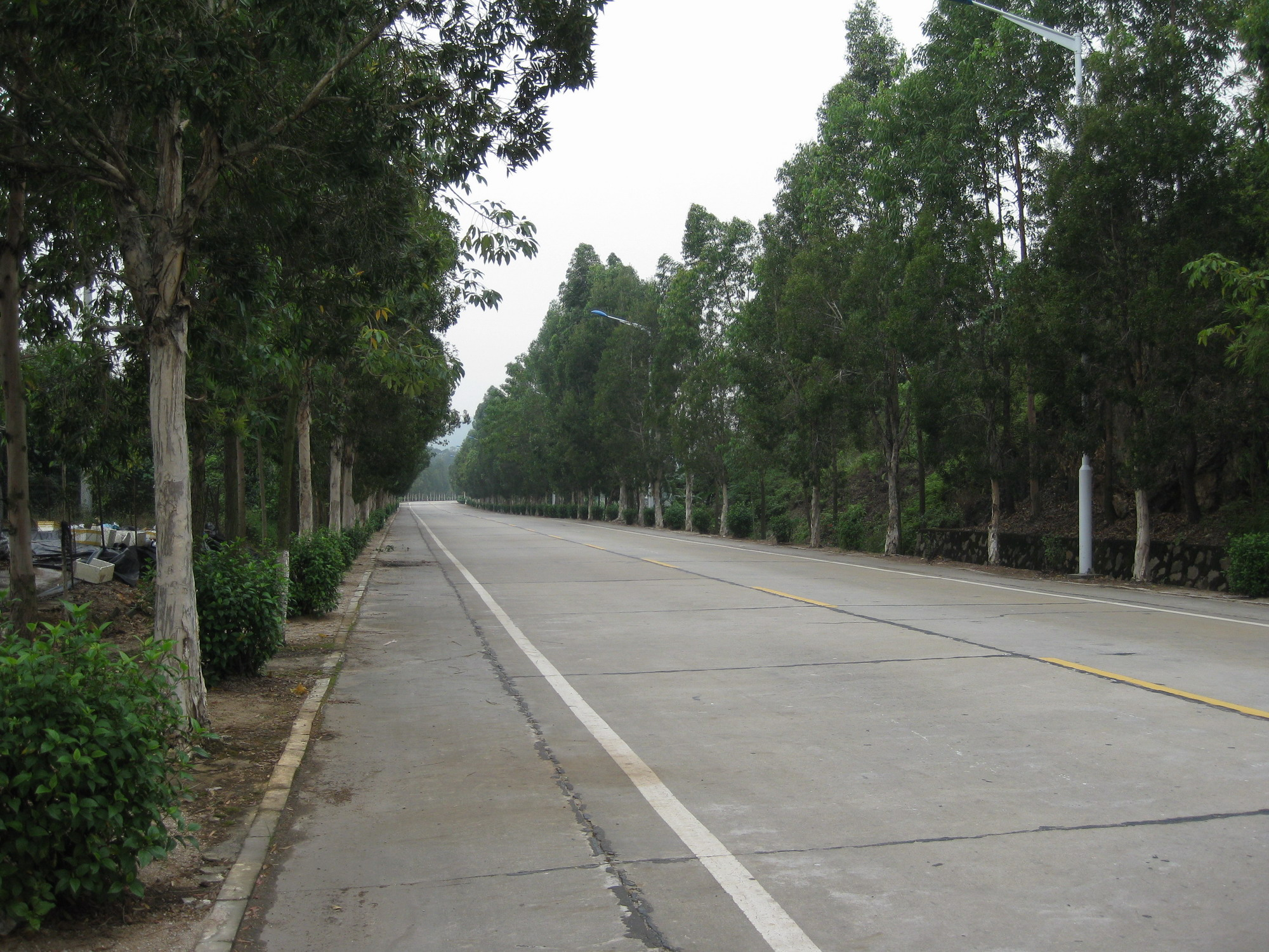 X533新会三江段